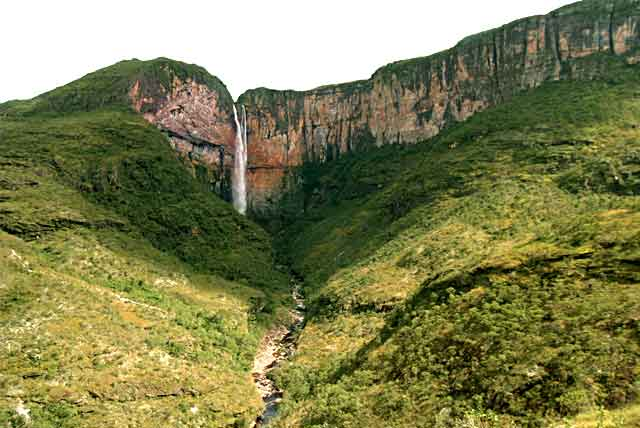 Esta é a cachoeira do Tabuleiro, maior de Minas Gerais, município de Conceição do Mato Dentro.